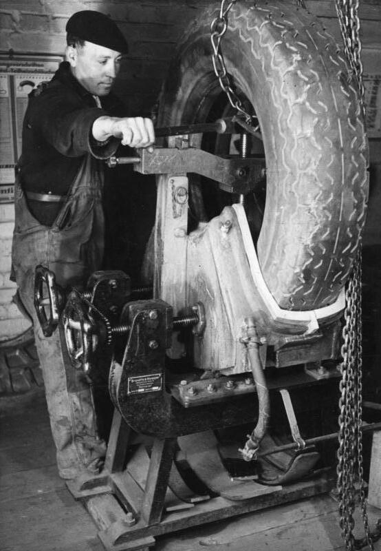 Berlin, Vulkanisierungswerkstatt Illus-Erich O.Krüger Berlin 1946; In einer Vulkanisierungswerkstatt: Auch früher hat man schon schadhafte Reifen neu "besohlt". Mittels Spezialmaschinen wird die alte Lauffläche losgelöst, die Karkasse sodann mit einem Gummilösungsanstrich versehen und mit dem sogenanten Polstergummi belegt. Ist der Rohlaufstreifen angerollt, erfolgt die Vulkanisierung. Defekter Reifen in Vulkanisierungsapparat Aufn: Illus - Krüger 216-46